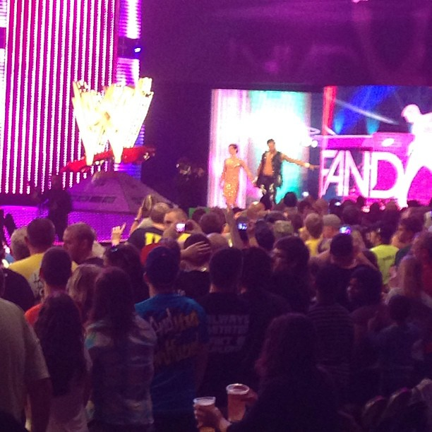 Fandango